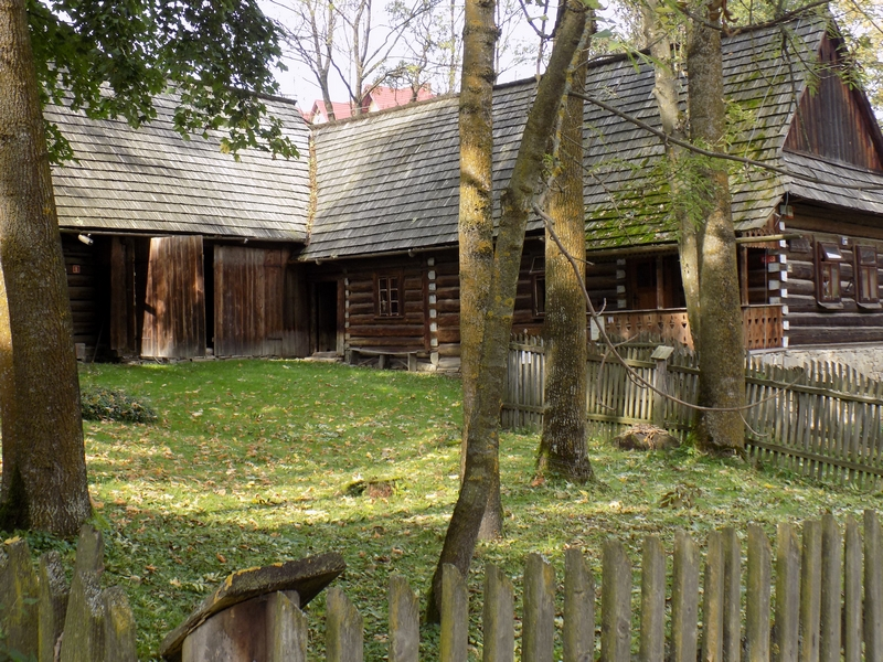 Zagroda Korkoszów, Czarna Góra, Zagóra 86. Wystawa stała Muzeum Tatrzańskiego w Zakopanem.